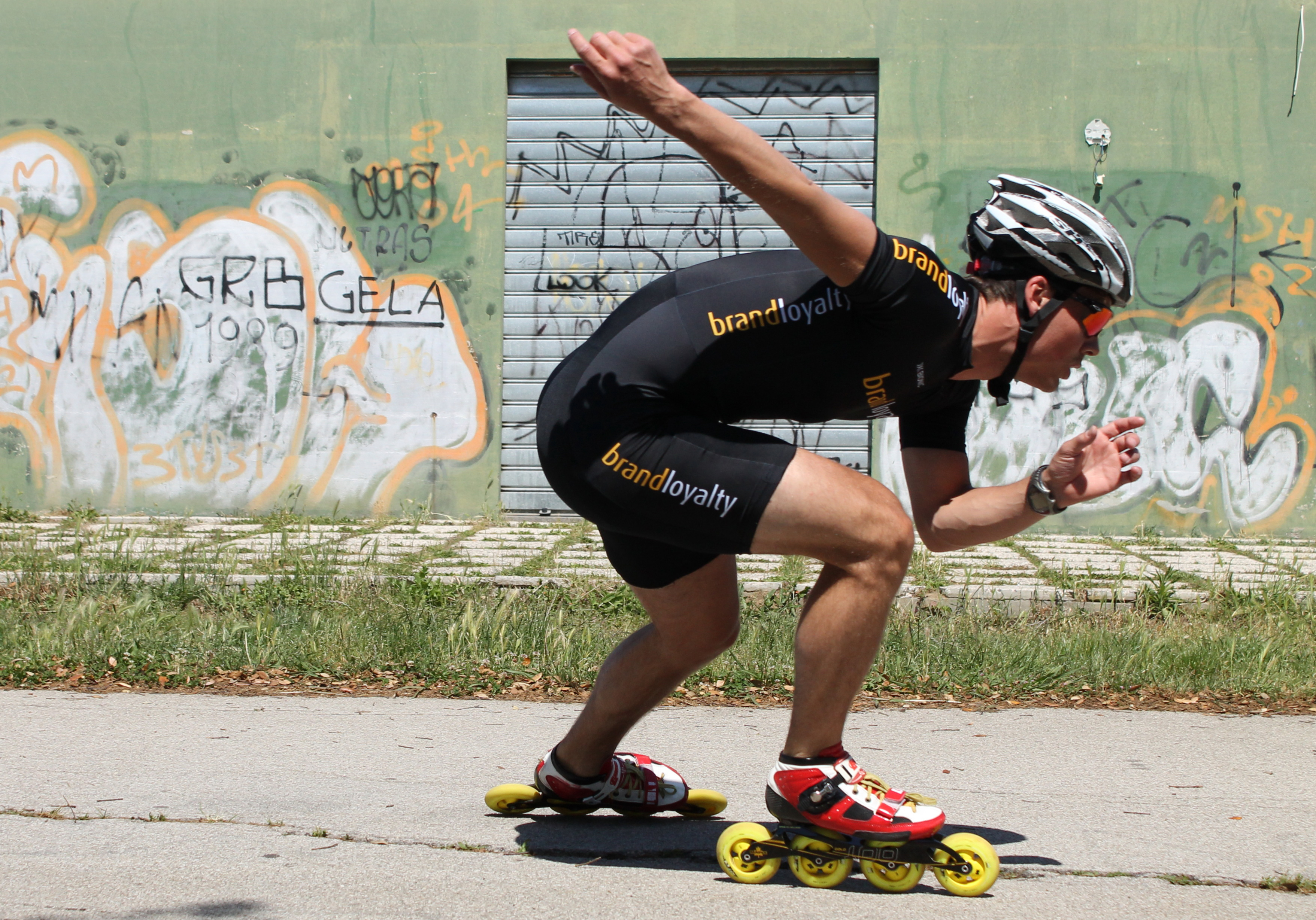 Jan Smeekens in actie tijdens een skeelertraining